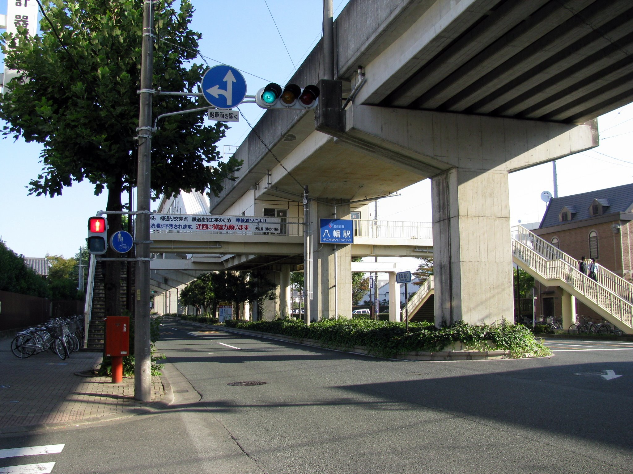 遠州鉄道八幡駅